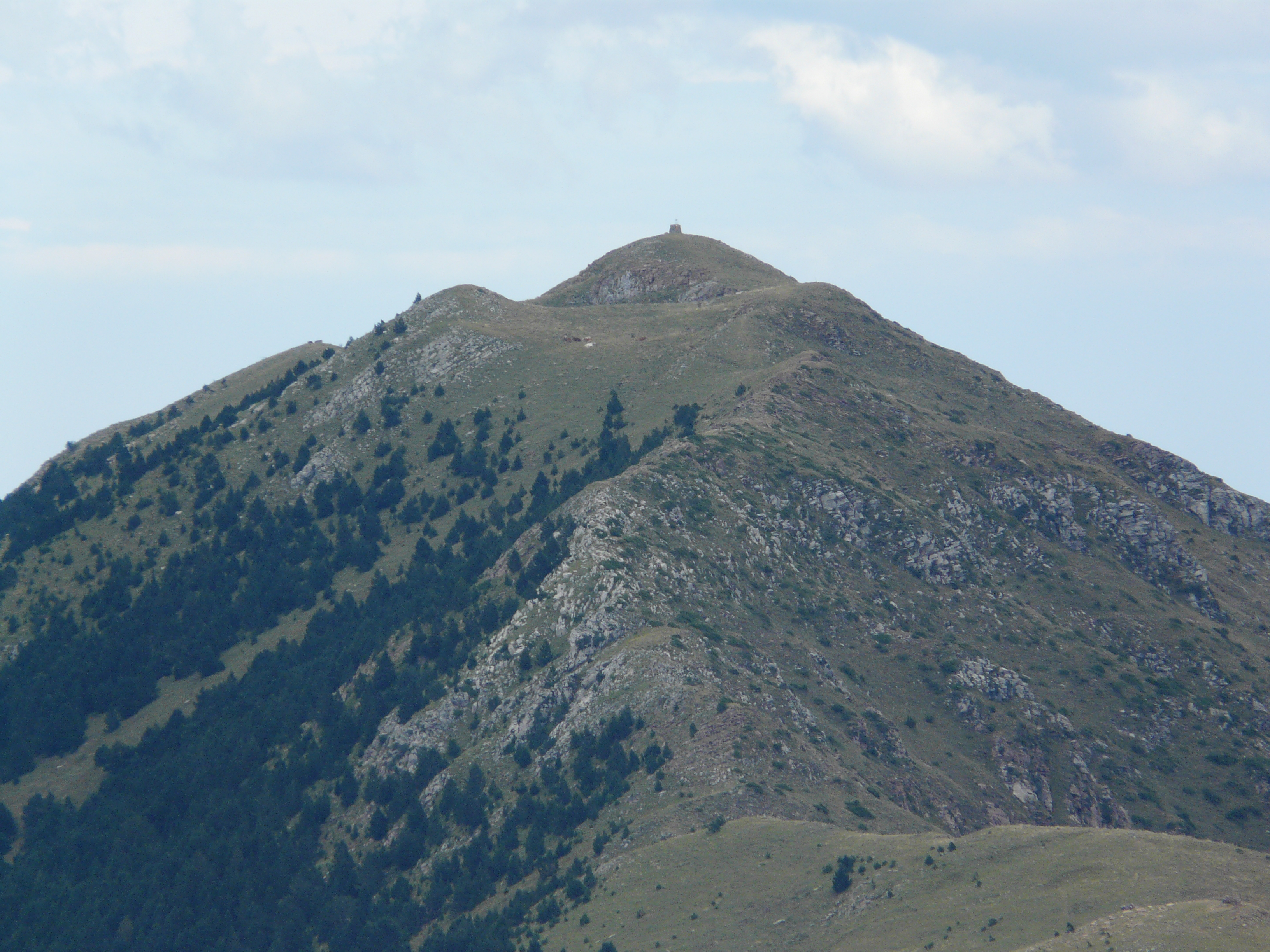 Serra Cavallera (Ripollès) (Ogassa, Pardines, Ribes de Freser i altres). This is a a photo of a natural area in Catalonia, Spain, with id: ES510174 Object location42° 16′ 48″ N, 2° 13′ 48″ E